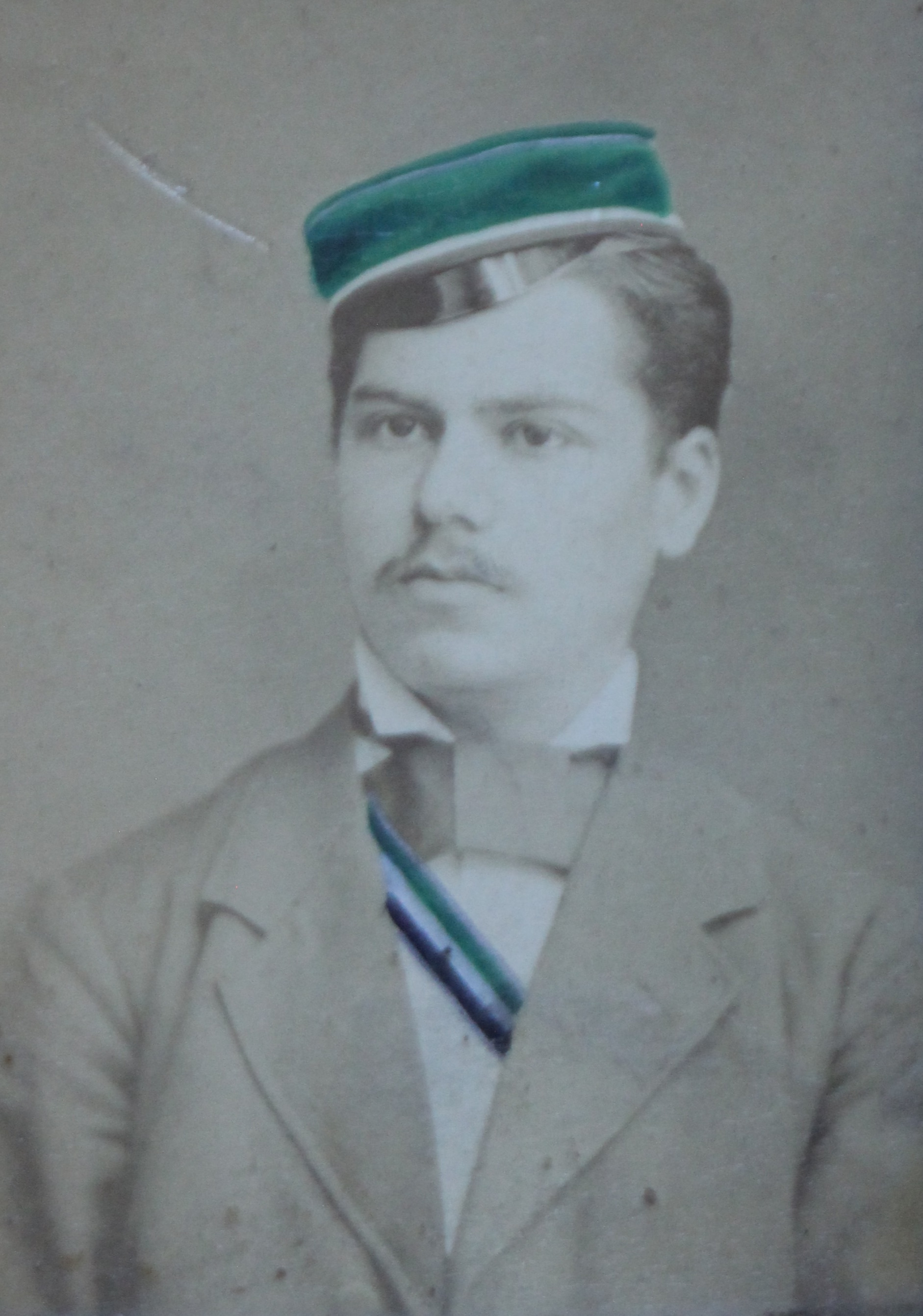 Porträtfotografie des späteren Posener Chirurgen Max Jaffé (1859–1909) als Student in Göttingen